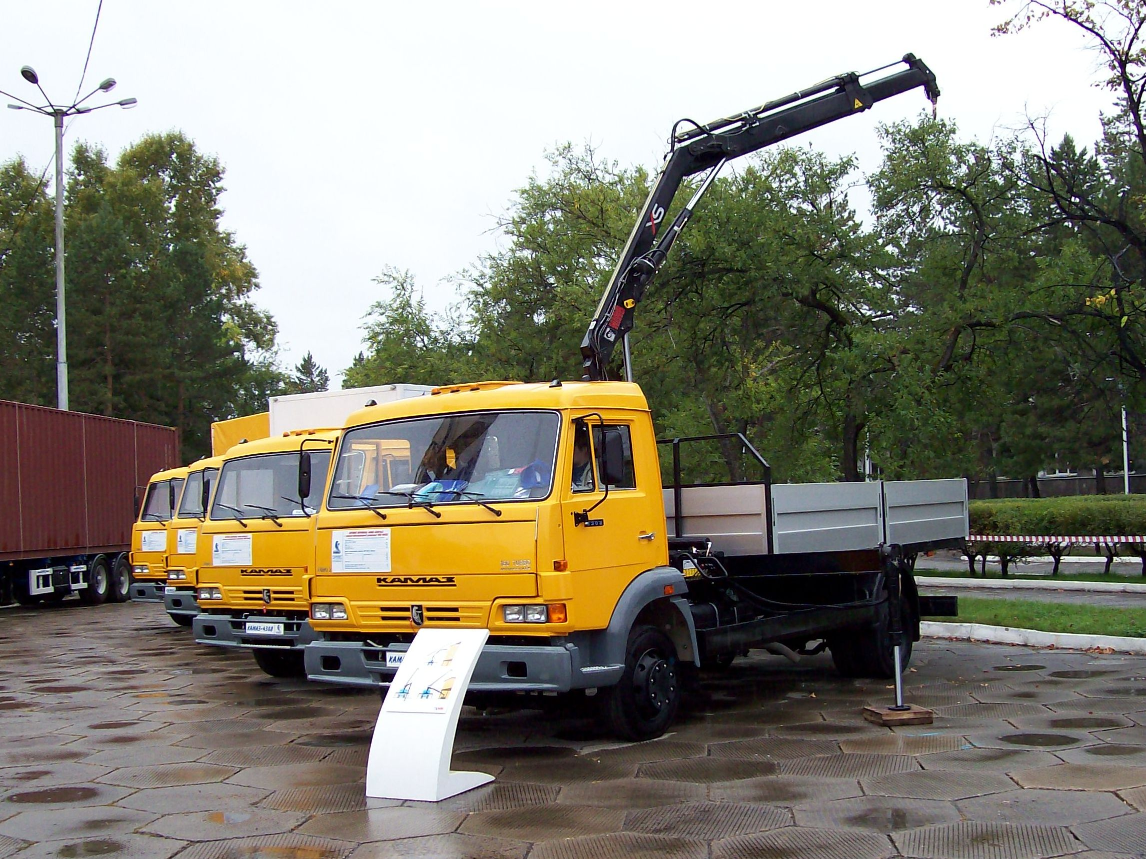 КАМАЗ 4308